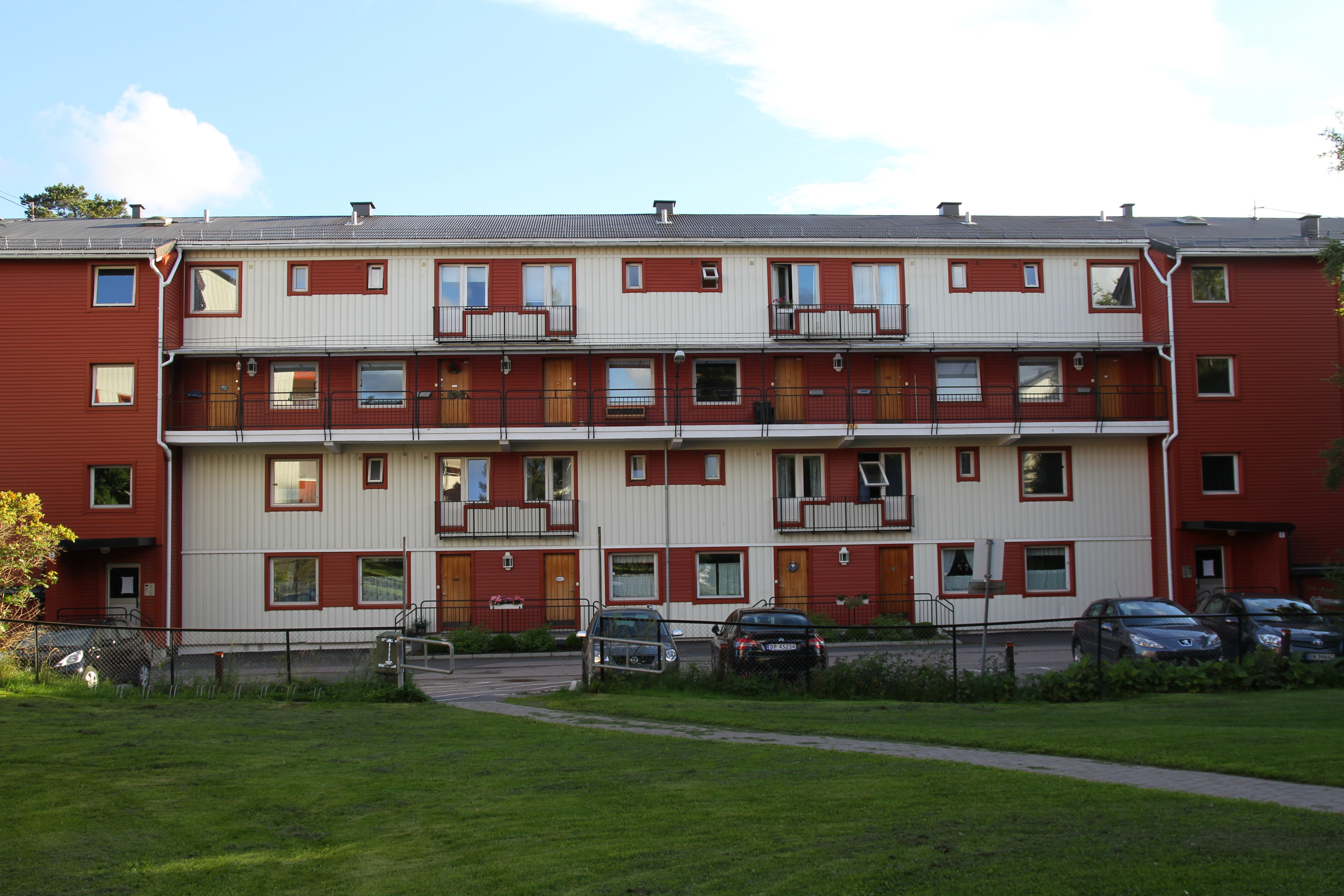 Bjartveien 2 i Oslo.